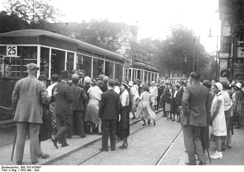 ADN-Zentralbild /Archiv Ausflugsverkehr zu Pfingsten 1932 in Berlin-Tegel. Die Ausflügler drängen sich an der Straßenbahn, um wieder in die Stadt zurückzukehren. 14457-32 [Scherl Bilderdienst]